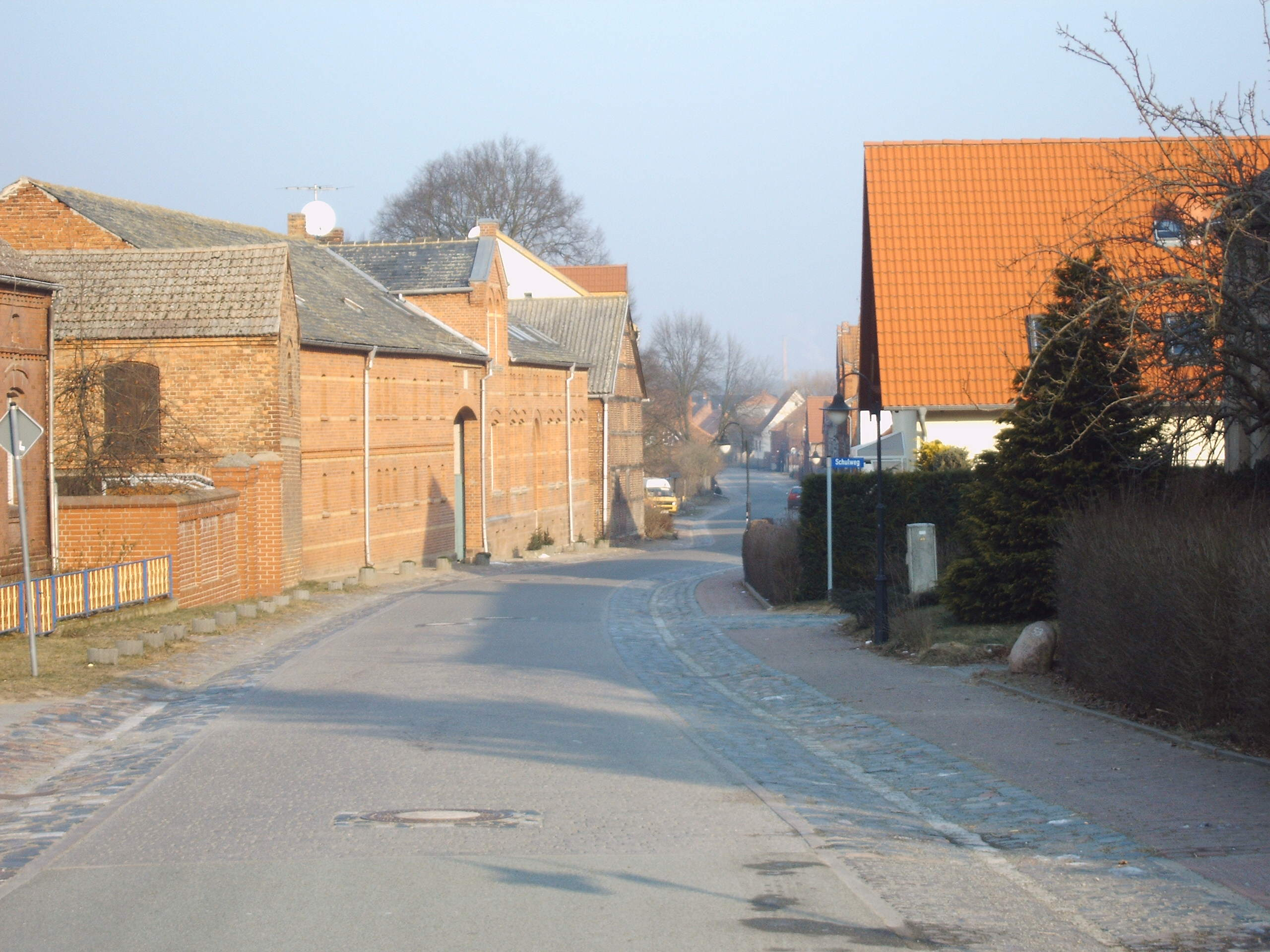 Dorfstraße von Dahlen, Bild aufgenommen von Olaf Meister am 26.1.2006